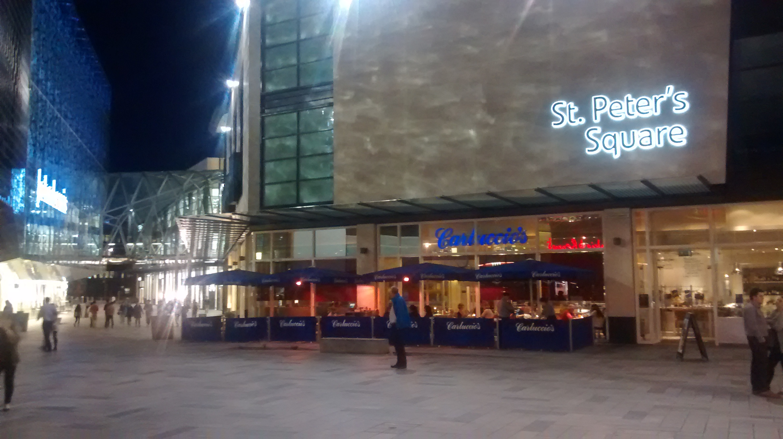 Plac Św. Piotra - Leicester